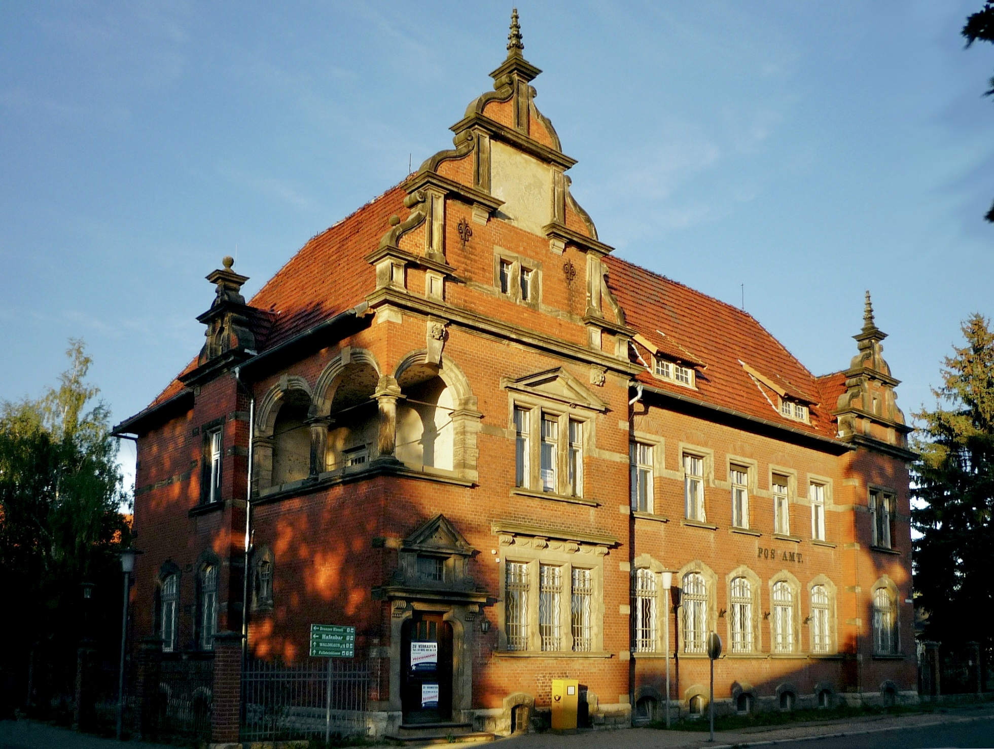 Das ehemalige Postamt von Osterwieck wartet auf eine anderweitige Nutzung.